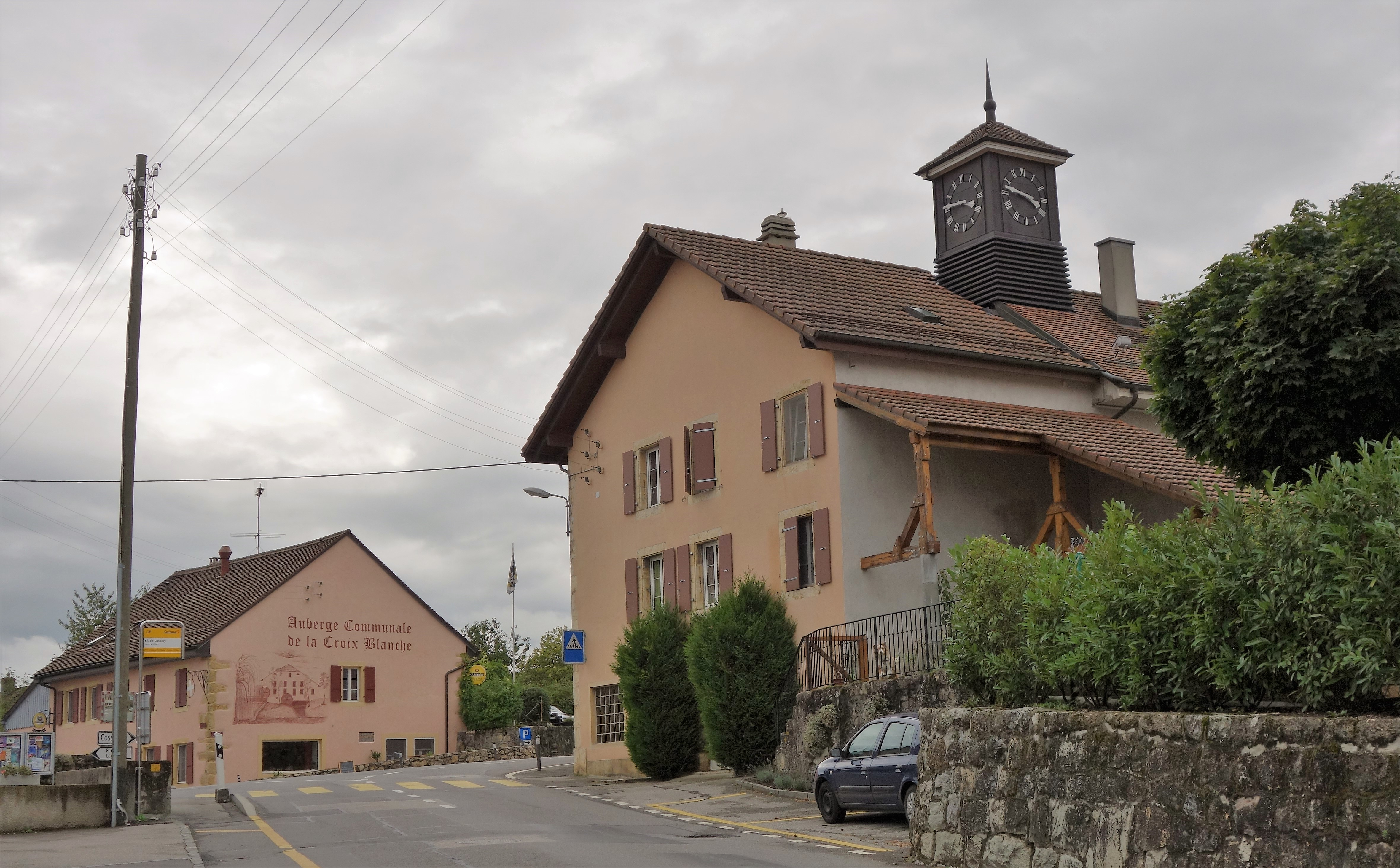 Lussery-Villars (canton de Vaud - Suisse) - centre de Lussery